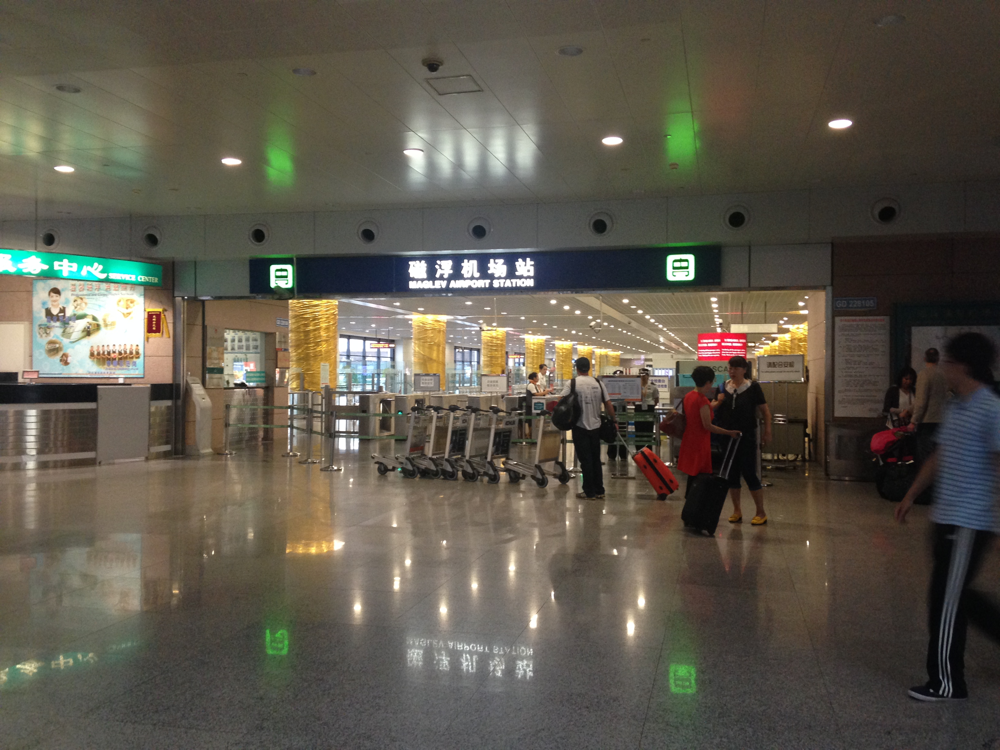 浦東国際空港駅(上海トランスラピッド)の入り口